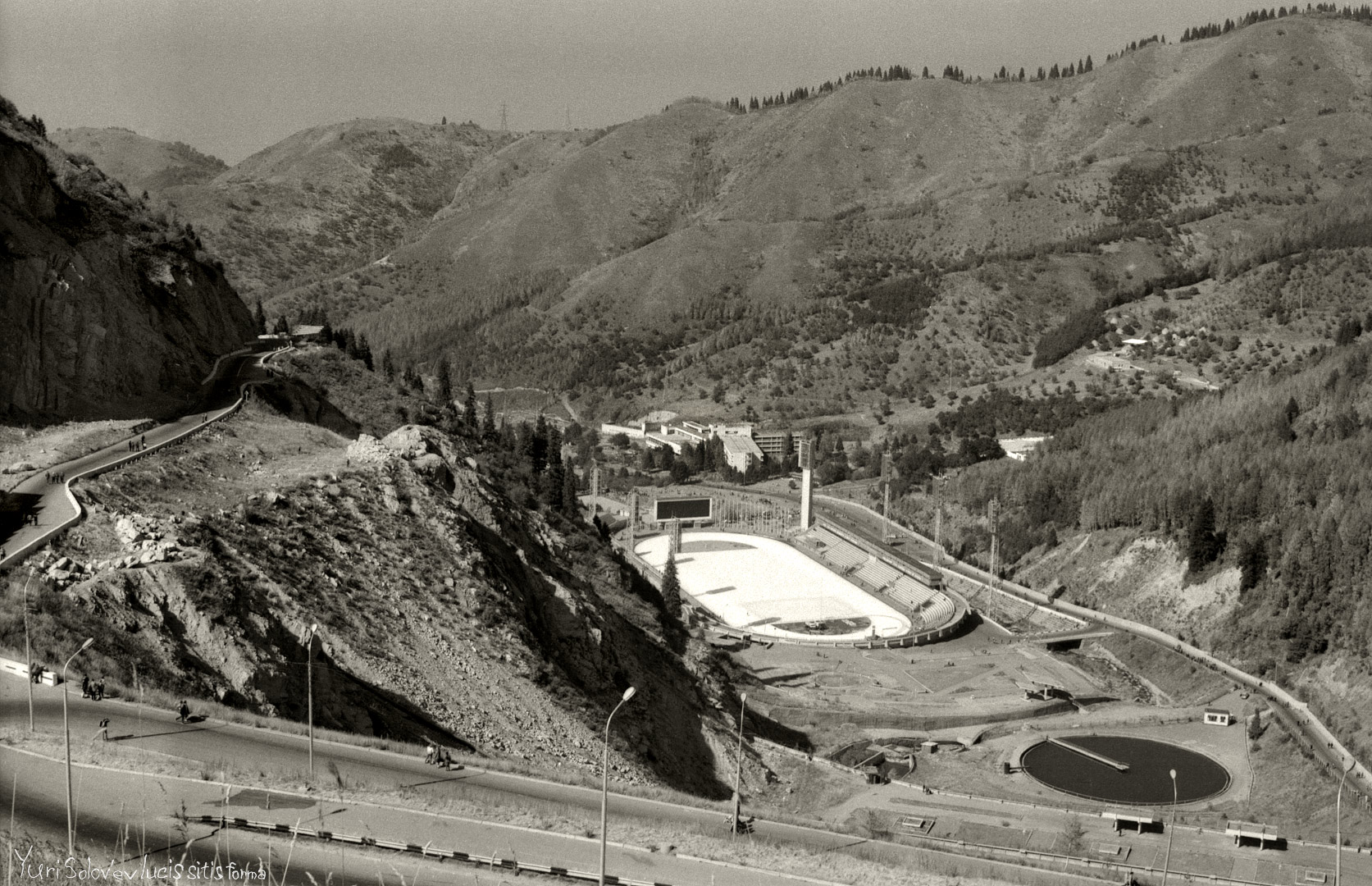 Вид на каток Медео